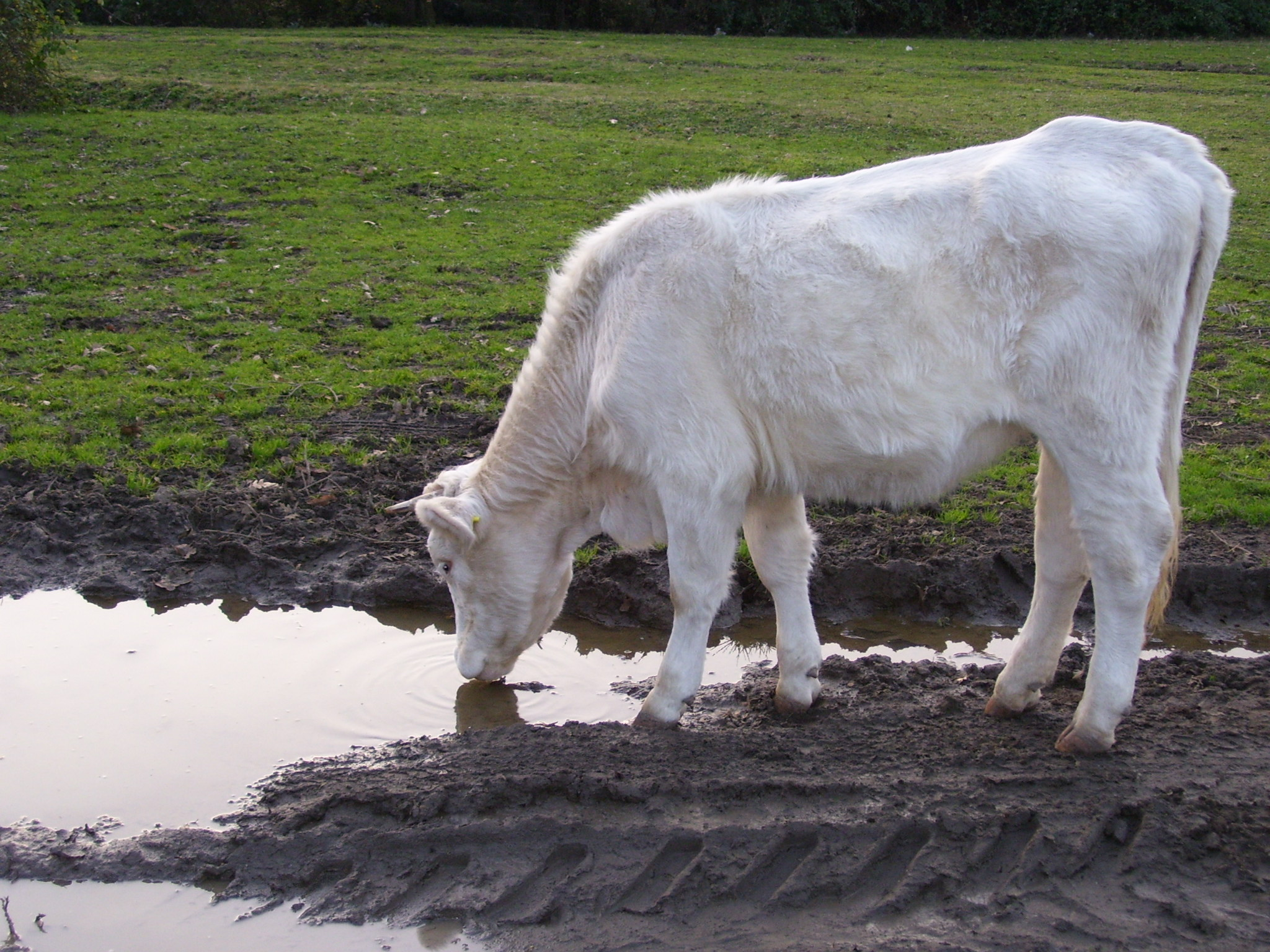 Mucca a Campagnano